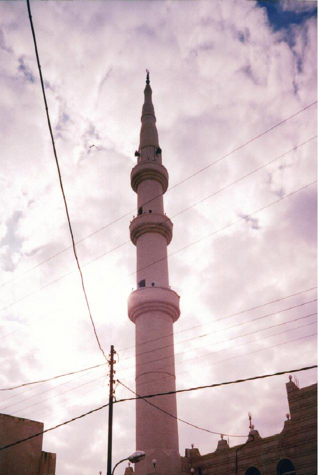 مأذنه مسجد دير ابي سعيد الكبير